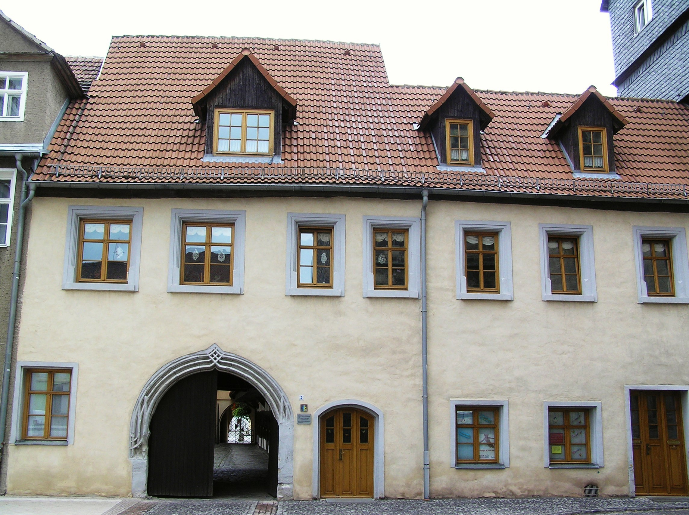 Neustadt an der Orla, Fleischbänke